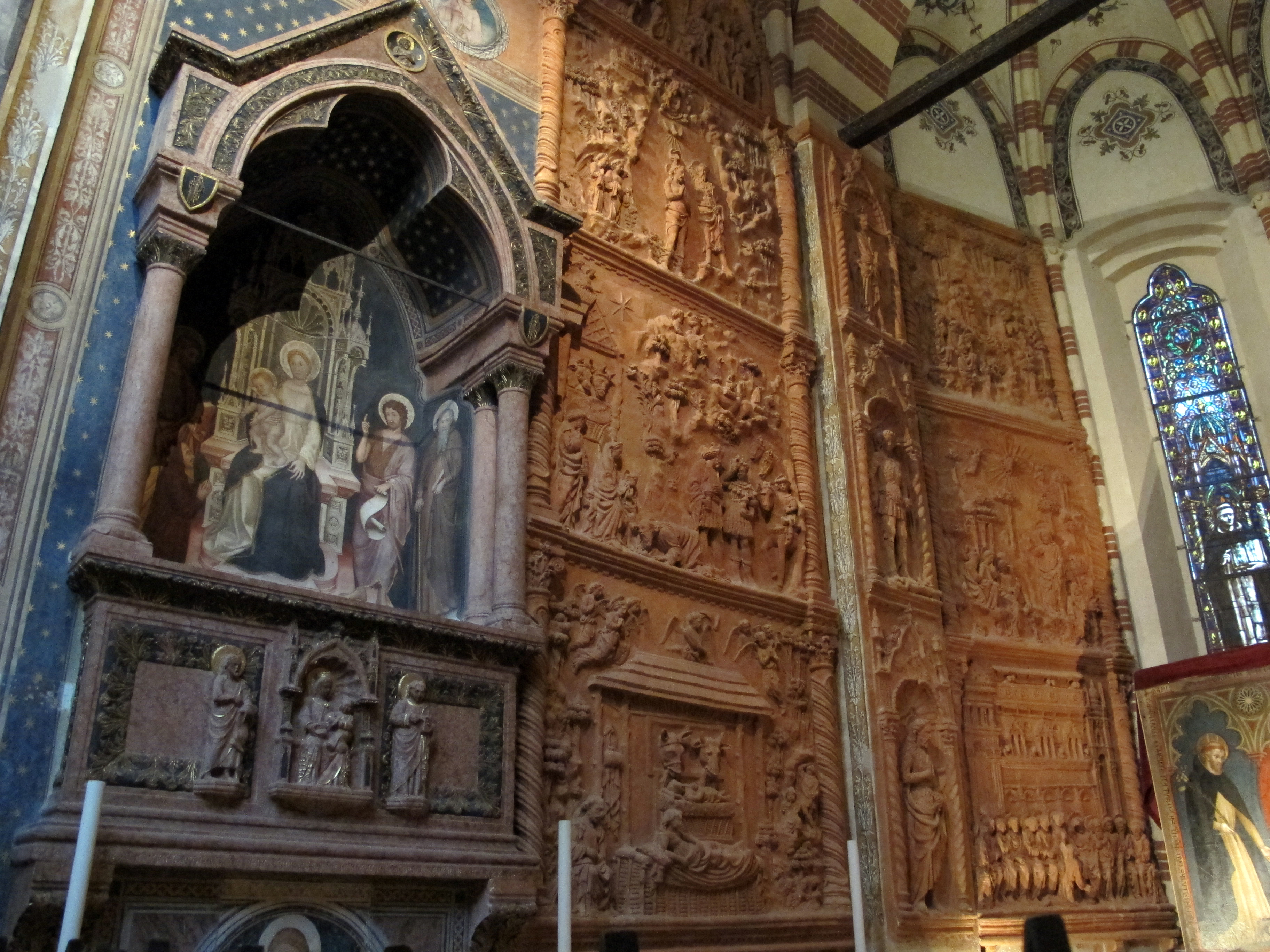 Santa Anastasia (Verona)